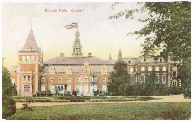 Pałac w Krowiarkach z 1908 roku